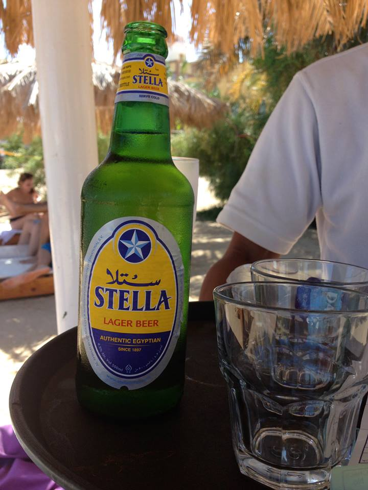 Kühler mit Aufschrift "Stella", ägyptische Biermarek